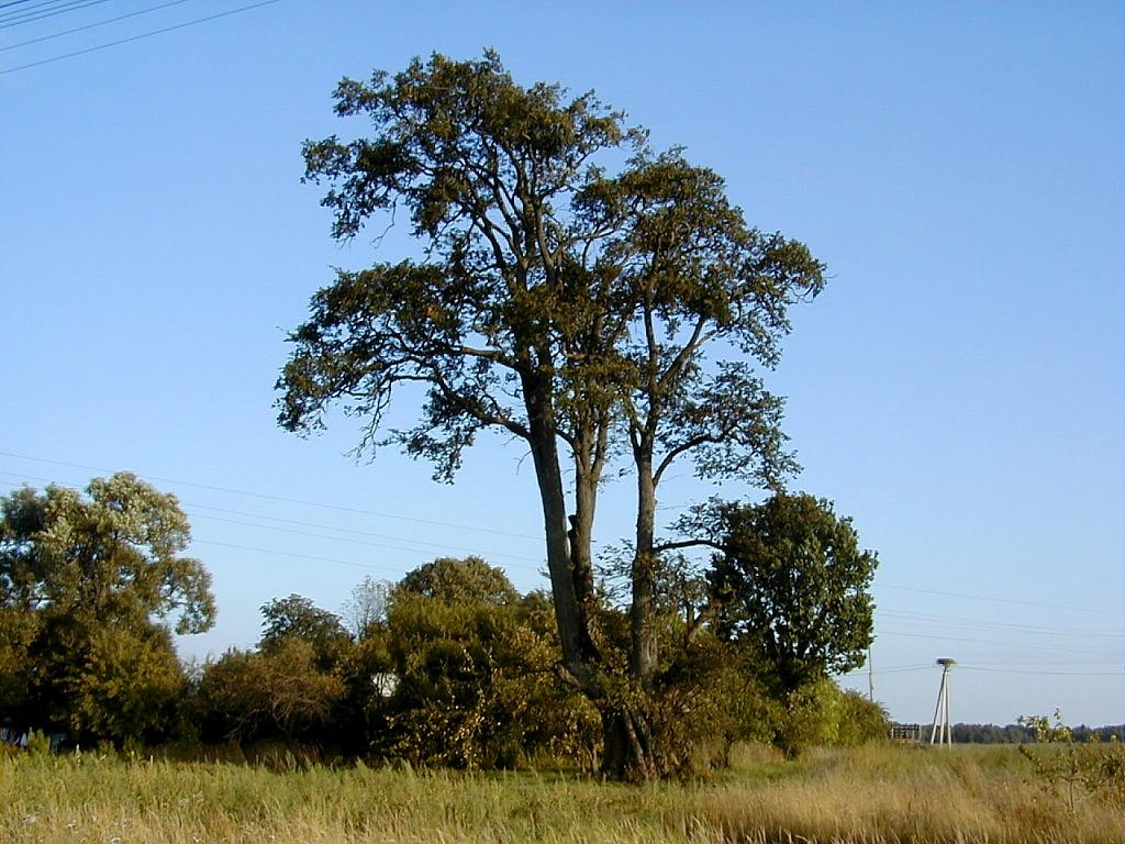 Lādzere, Latvijas lielākā vīksna 1999-09-04